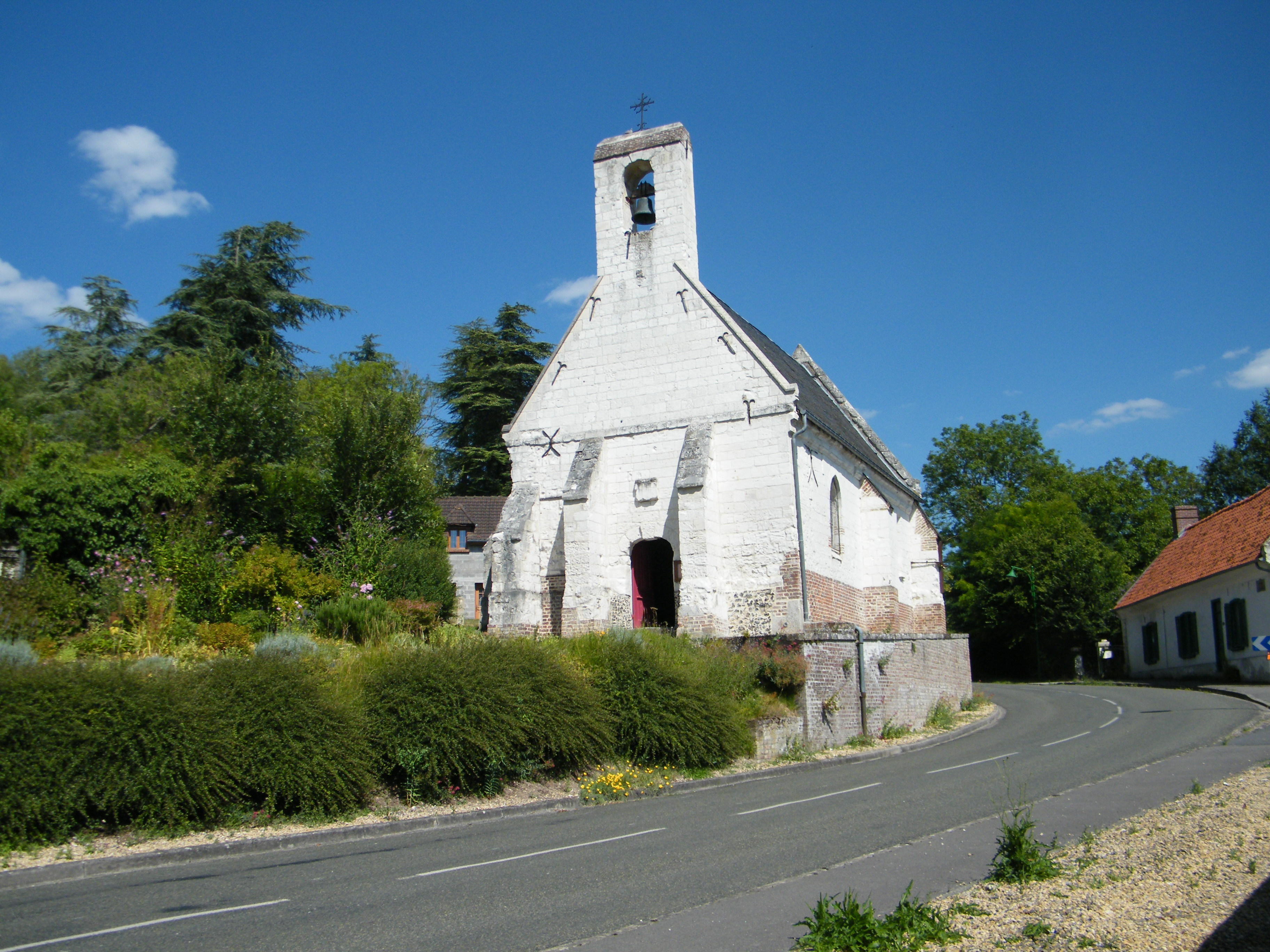 Cocquerel (Somme, France), Longuet, chapelle